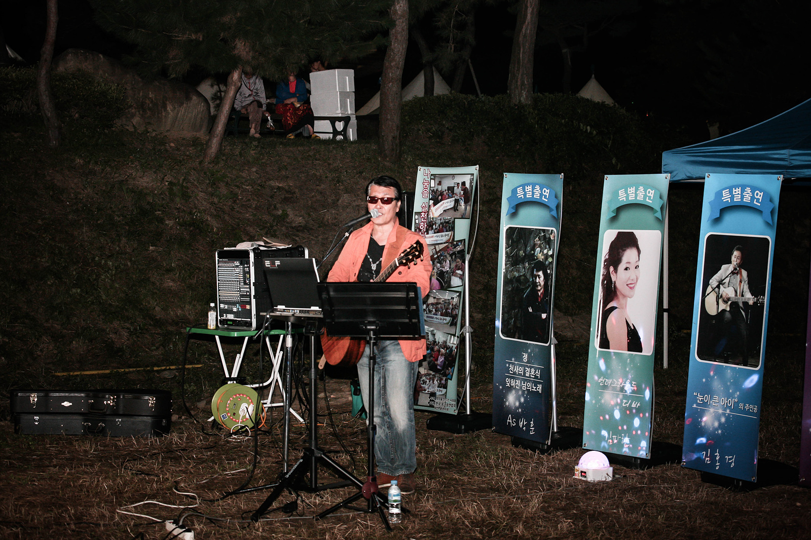 충청북도 괴산군에서 음악인이 자선 버스킹을 하고 있다.